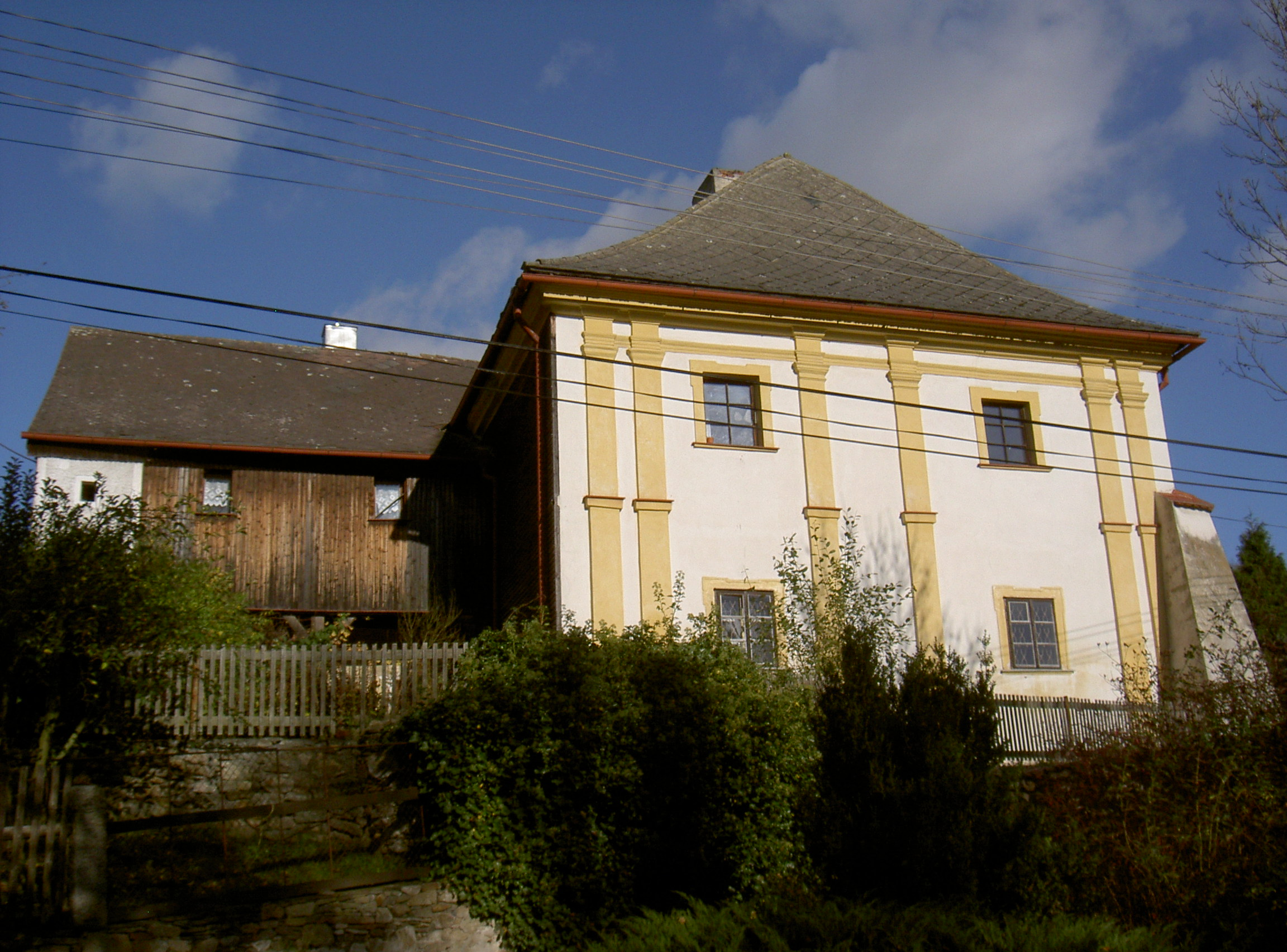 Pfarrhaus in Heilig Kreuz